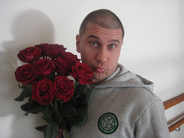 Underhållaren Marko "Markoolio" Lehtosalo.